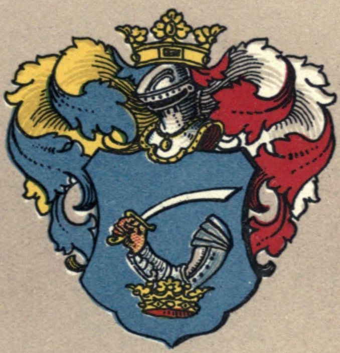 A Futásfalvi Bardócz ág címere